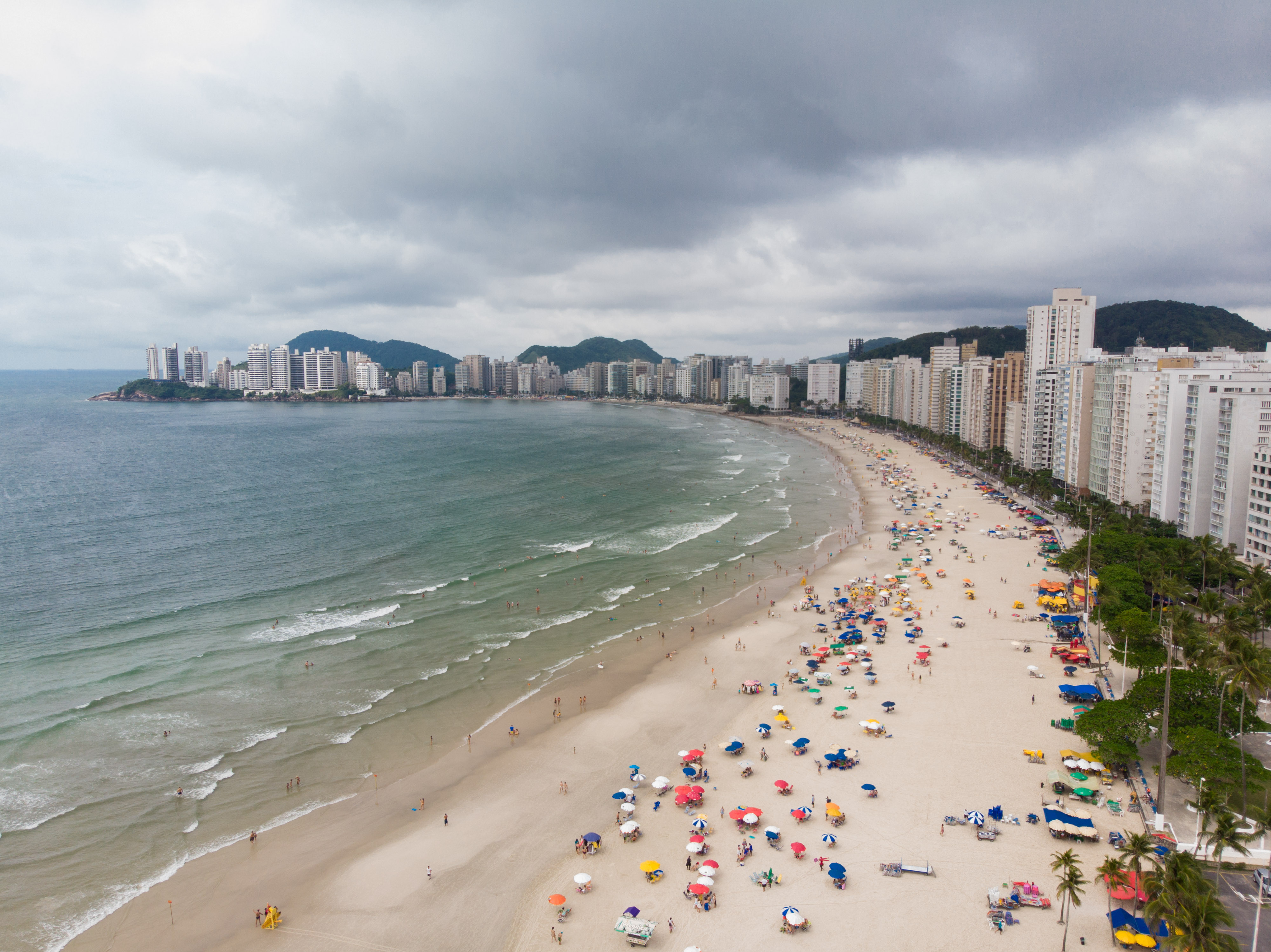 O governador Márcio França, participa do Início da Operação Verão no Guarujá, Litoral Paulista Local: São Paulo/SP Data: 19/12/2018. Foto: Governo do Estado de São Paulo